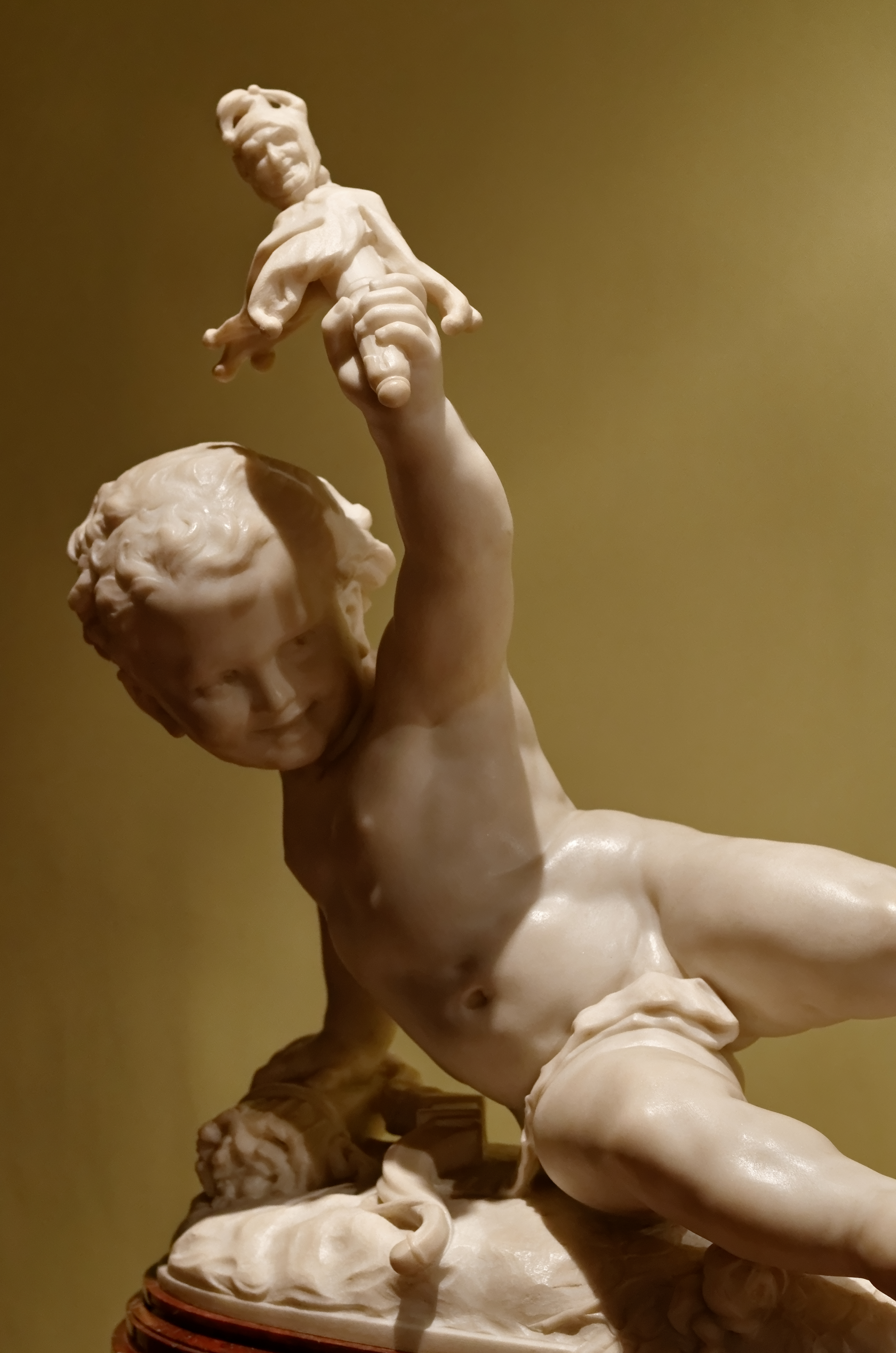 L'amour à la folie, marbre de Jean-Baptiste Carpeaux (1872) exposé au musée Calouste Gulbenkian, Lisbonne. Inv 563